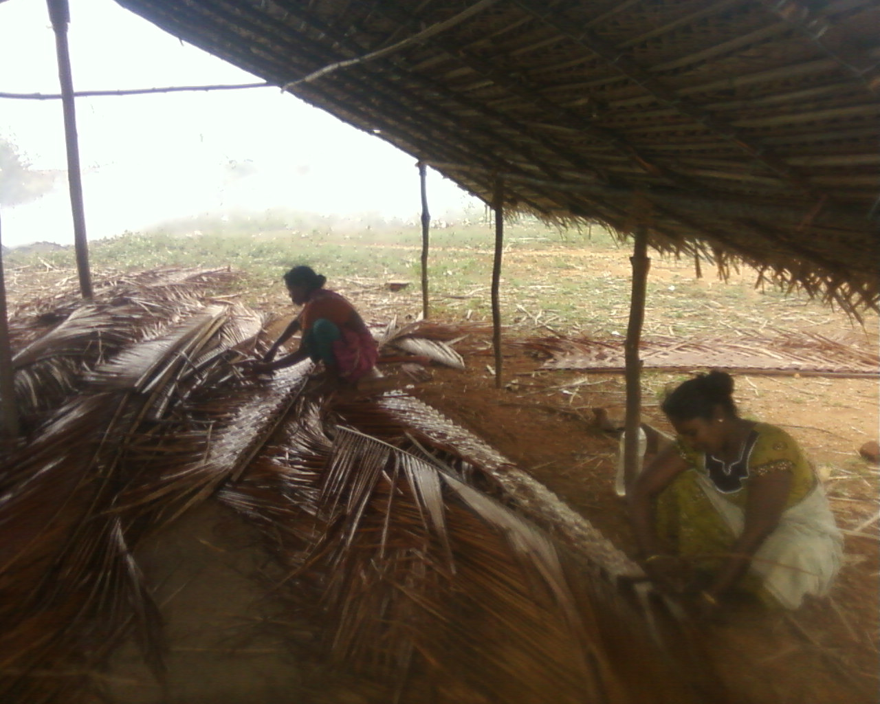 இந்தியாவில் இலங்கைத் தமிழர்கள் முகாம் கீற்று முடைதல்